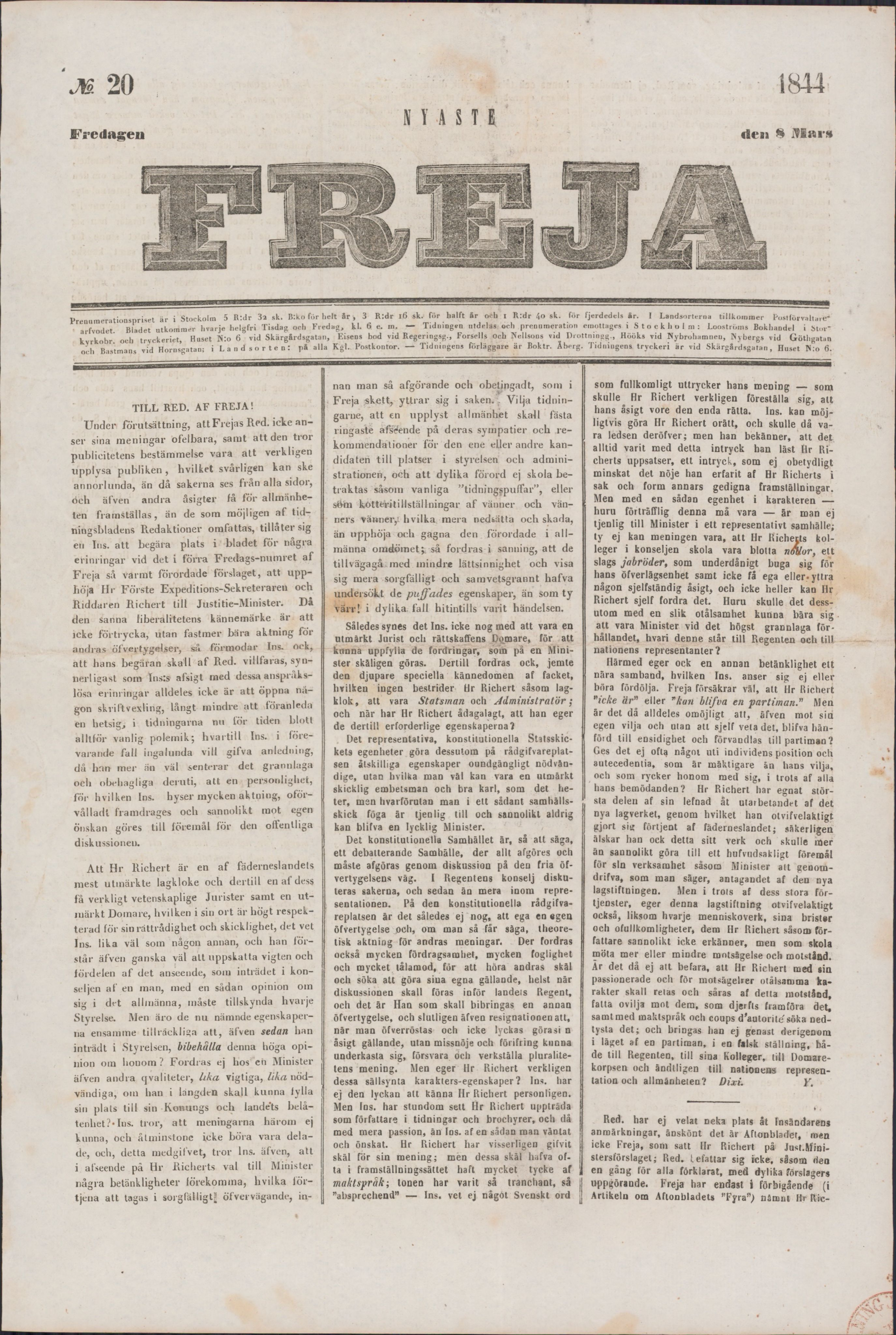 Freja 1844-03-08 (troligen sista numret)